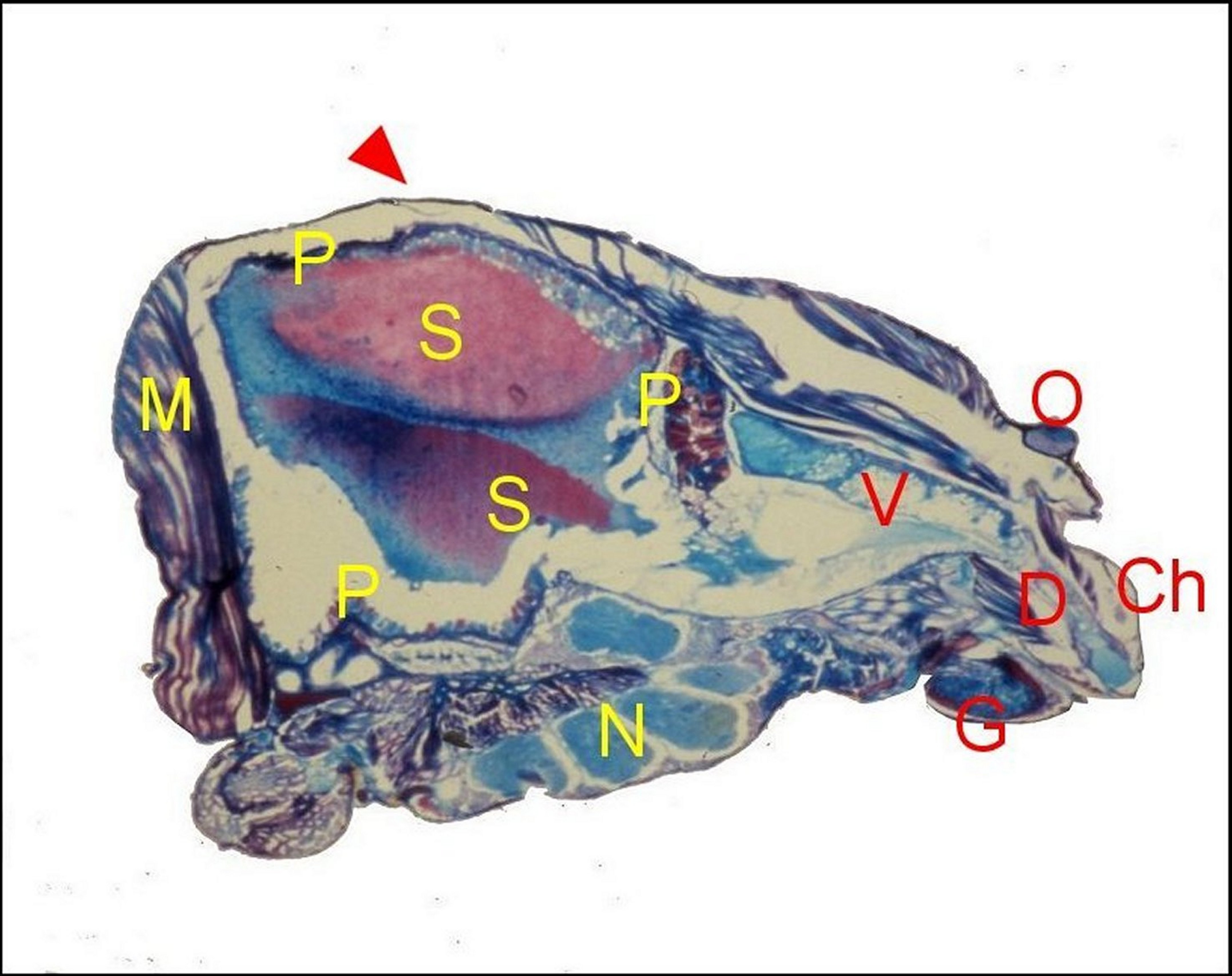 Scytodes thoracica, glande venimeuse à deux parties : venimeuse et séricigène. Coupe histologique parasagittale du prosoma (coloration trichromique).